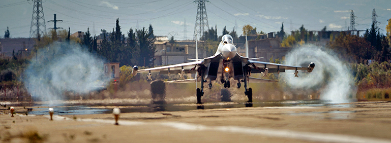 Будни авиагруппы ВКС РФ на аэродроме Хмеймим в Сирии